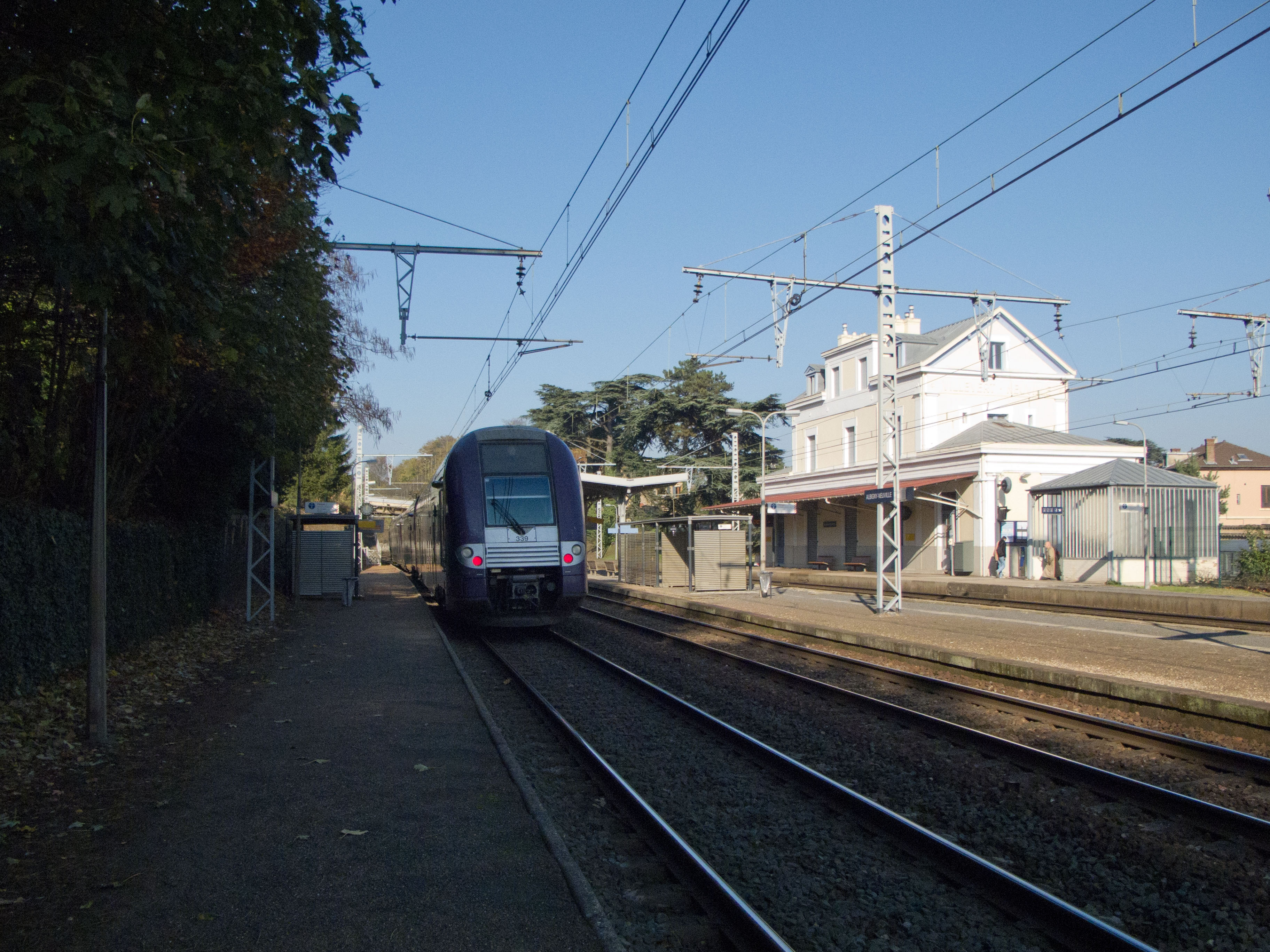 Gare d'Albigny-Neuville, Albigny-sur-Saone, France